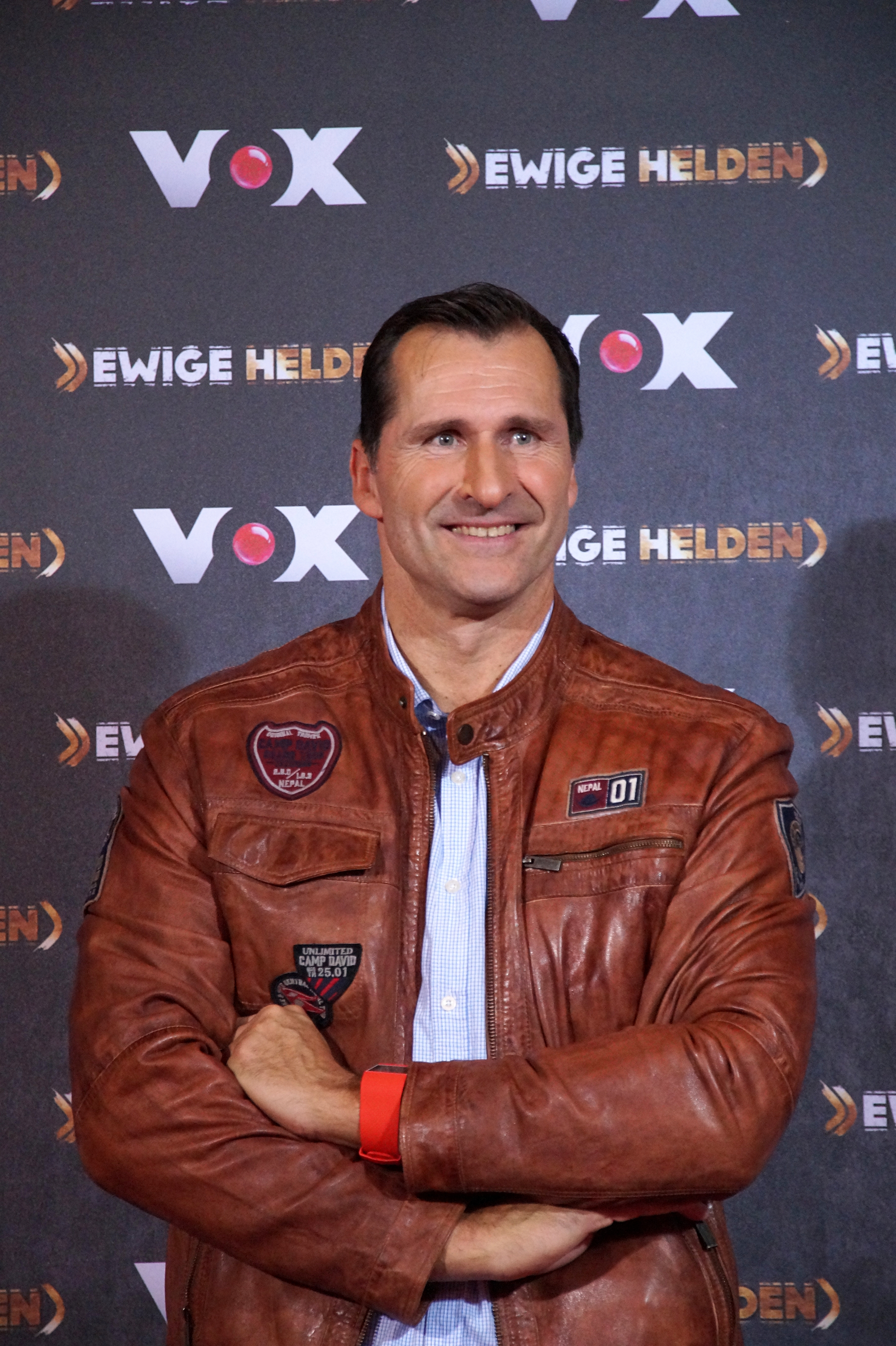 Lars Riedel beim VOX "Ewige Helden" Pressetermin, im Dezember 2015.